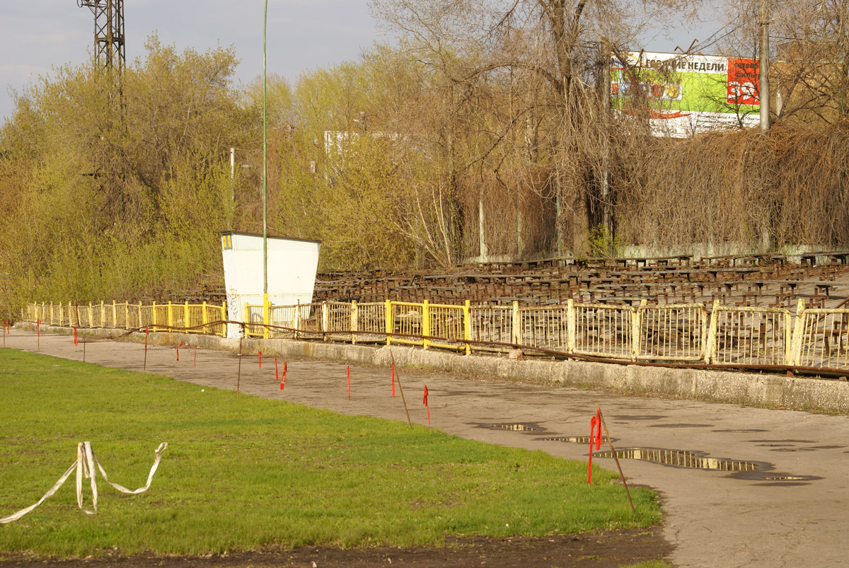 Самара, Стадион «Торпедо-4»